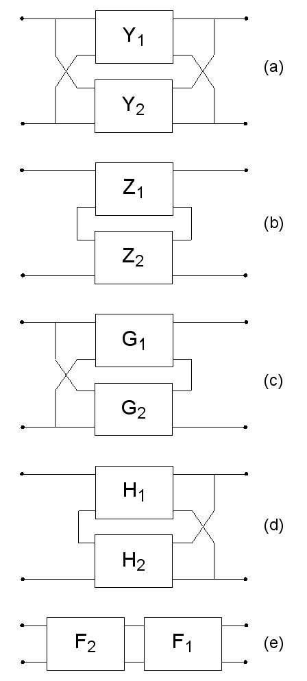 Combinación de cuadripolos